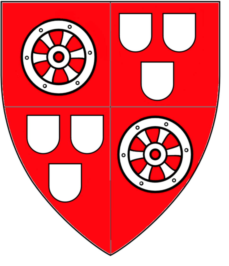 Wappen des Erzbischofs Konrad II. von Weinsberg nach seinem Epitaph aber mit korrektem Mainzer Rad entsprechend Blasonierung